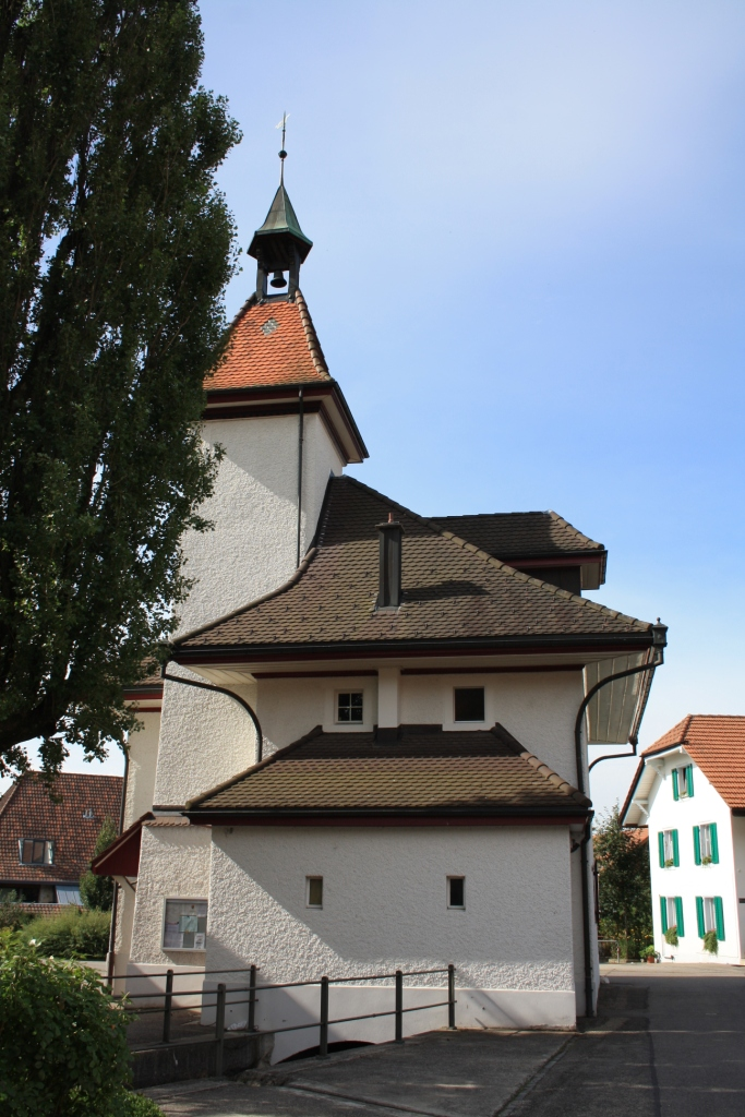 Gemeindehaus Attiswil